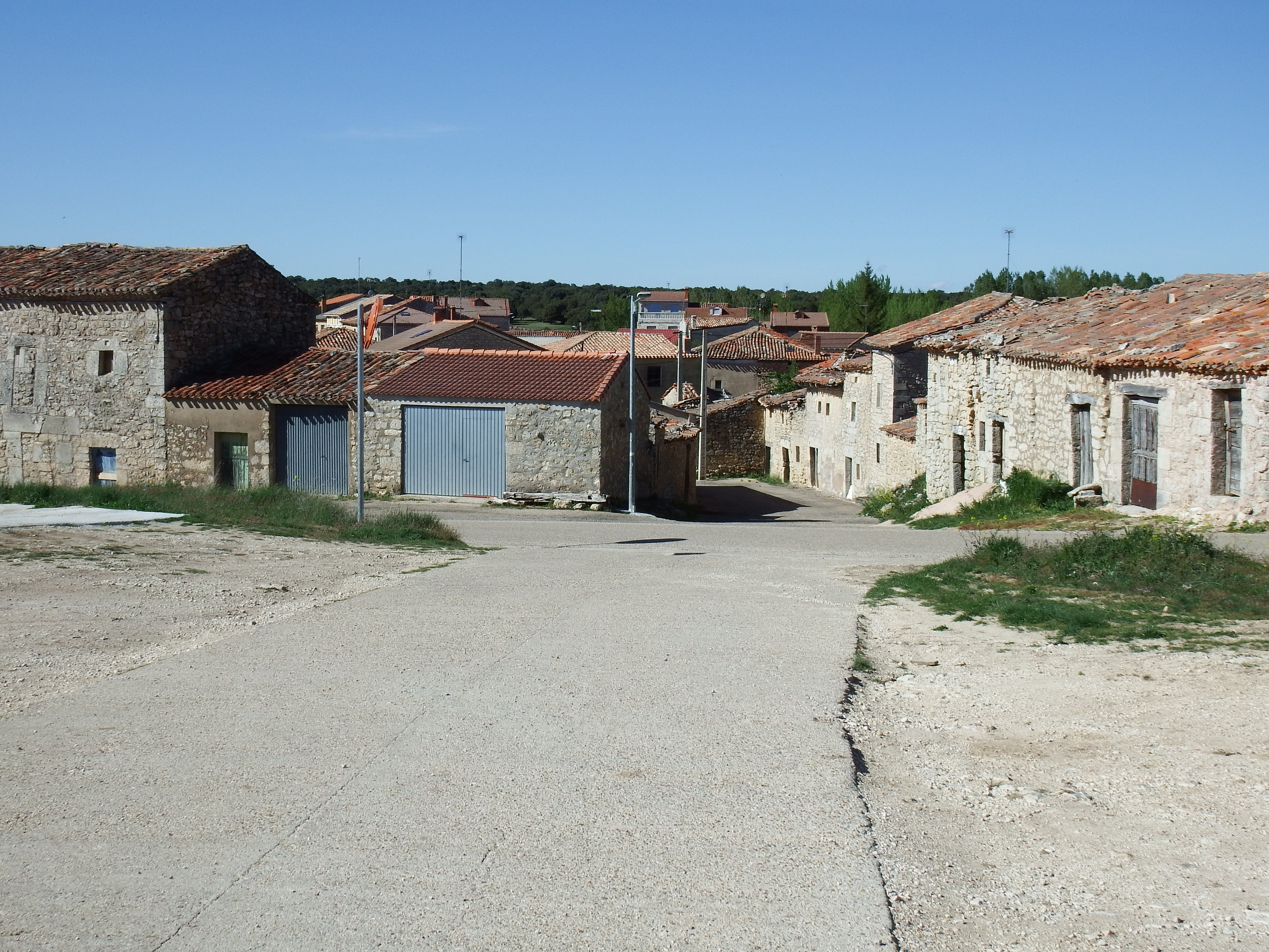 Cilleruelo de Arriba